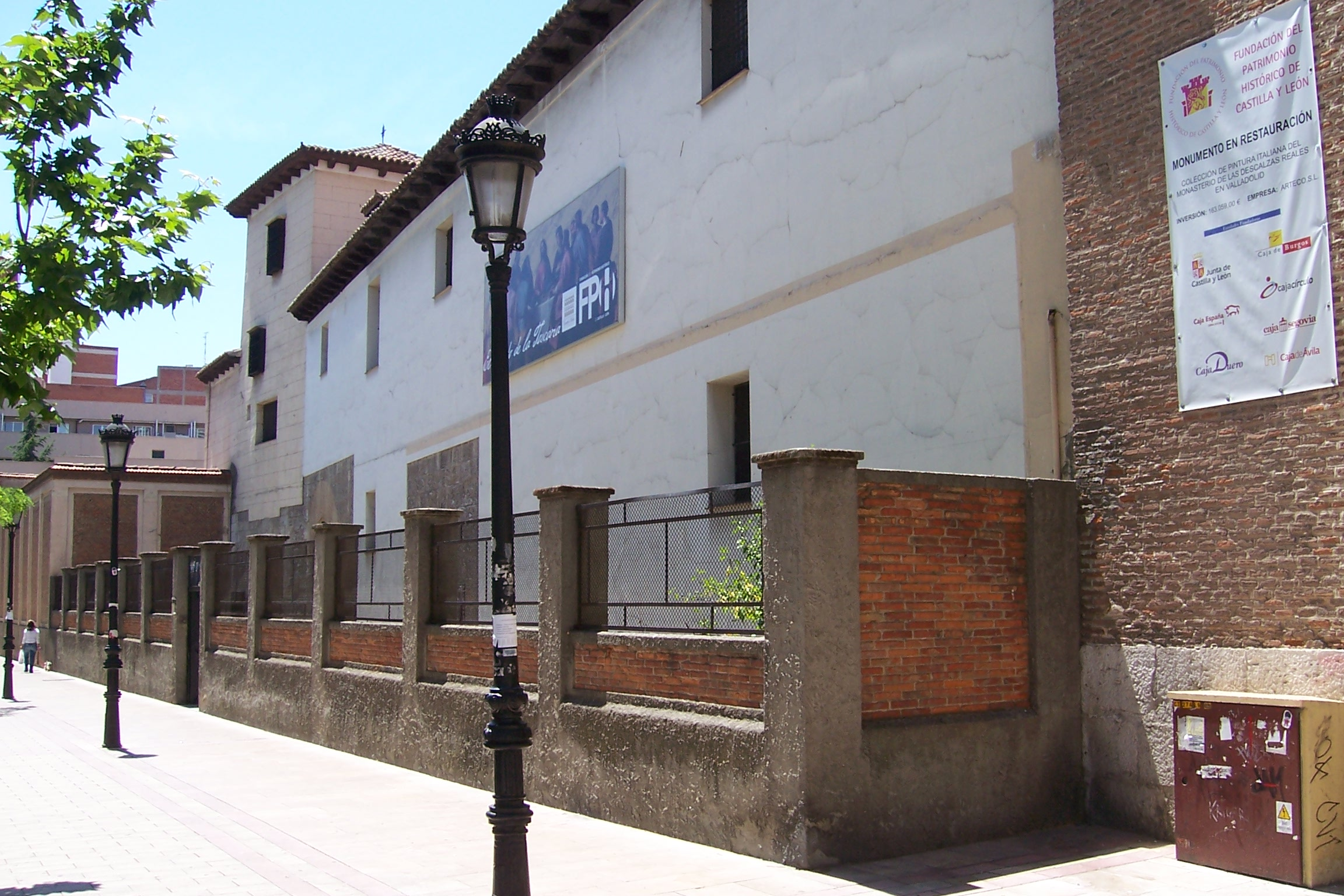 Convento de las Descalzas Reales de Valladolid. Dos casas-palacios en la calle de Ramón y Cajal que fueron compradas a Alonso de Argüelles y que rematan con un torreón de esquina. Conservan las dos puertas de arco de medio punto con grandes dovelas de piedra.sobre la fachada.